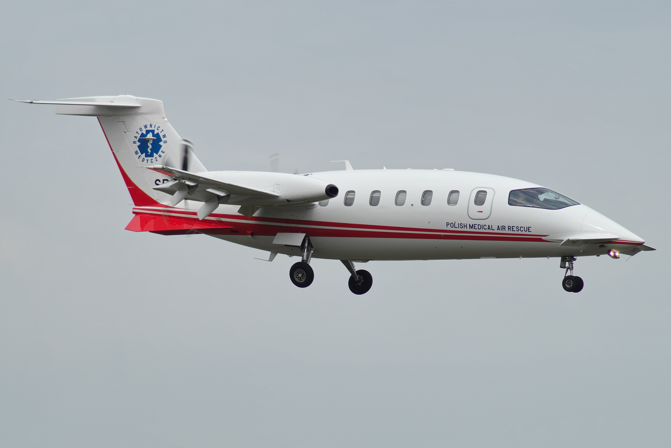 Piaggio P.180 - Lotnicze Pogotowie Ratunkowe, Warszawa - Okęcie (EPWA)